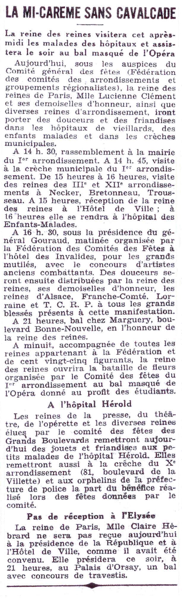 Article sur la Mi-Carême à Paris 1931